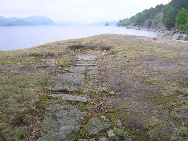 Steinsetting ved Roklubbens hytte Jomfruhalvøya ved Farris i Larvik